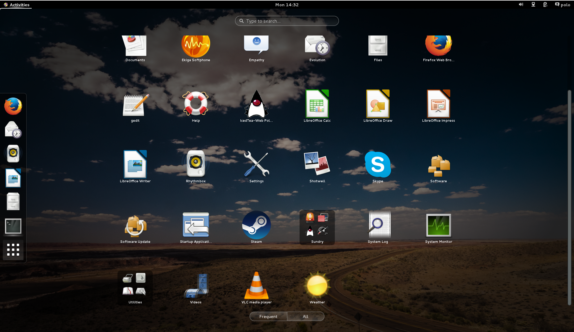 CentOS 7.1 s prostredím GNOME 3.8